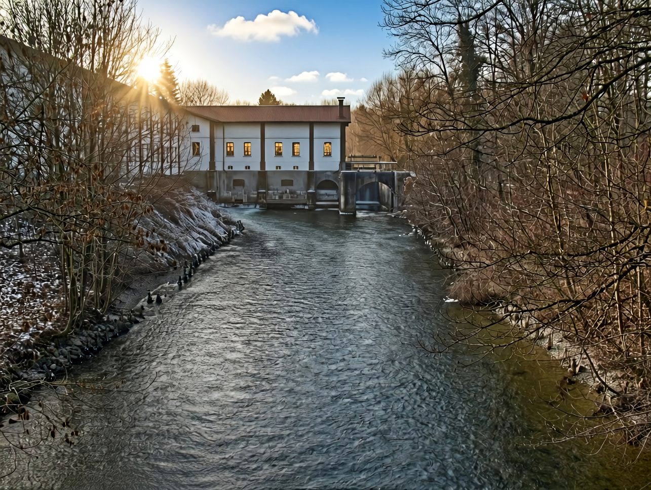 Deutschland, Bayern, Fürstenfeldbruck, Olching, Elektrizitätswerk am Mühlbach